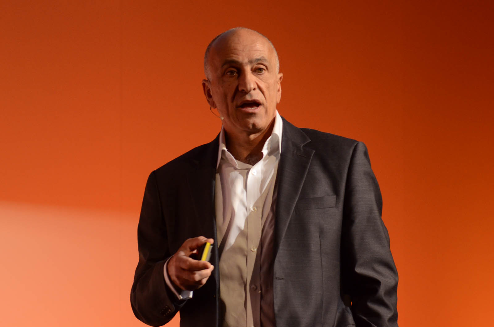 Open Stage – José Achache